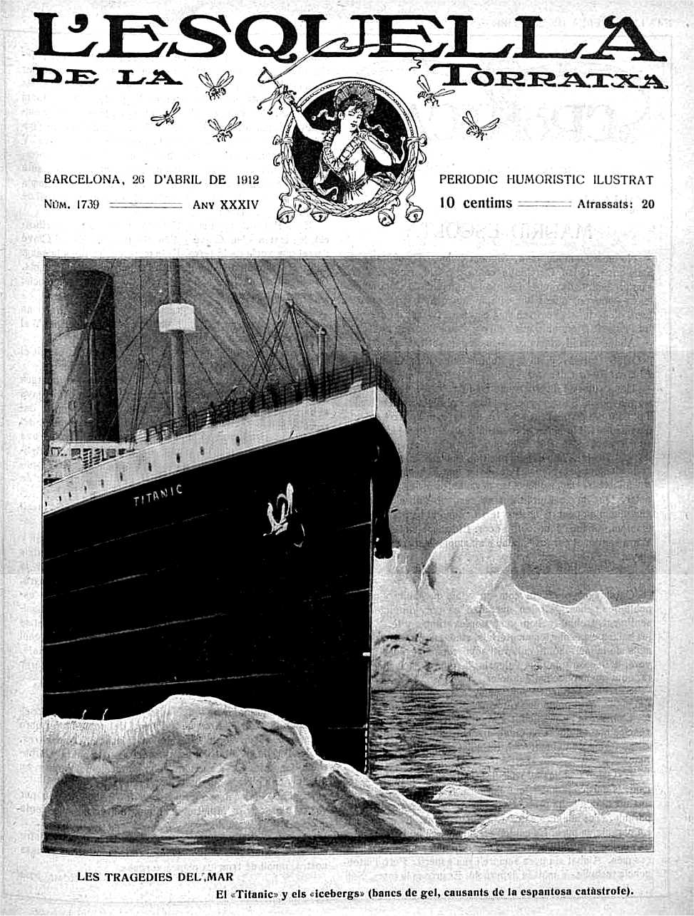 Les tragedies del mar el "Titanic" y els "icebergs" (bancs de gel, causants de la espantosa catastrofe).